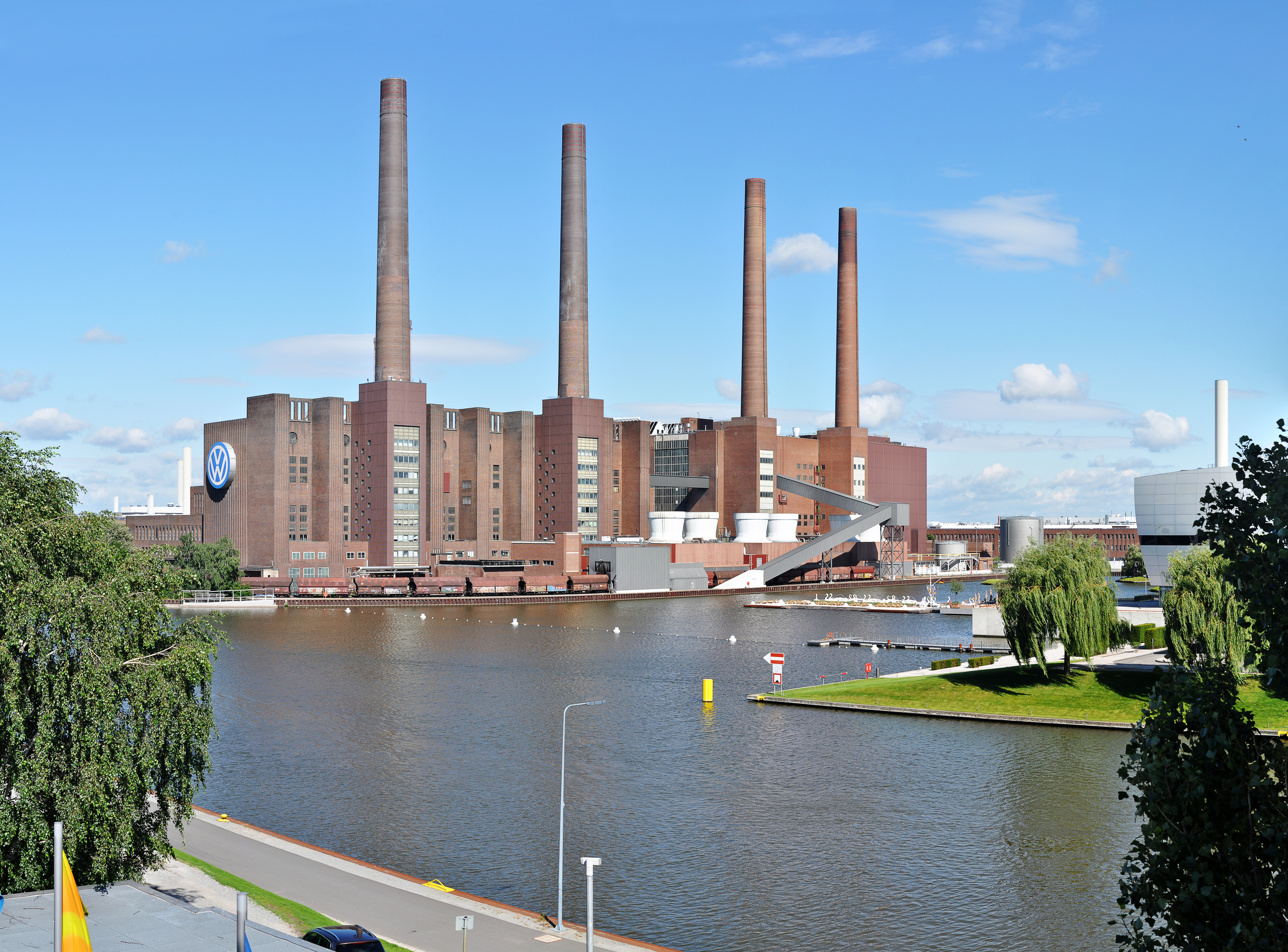 Heizkraftwerk Wolfsburg Nord am Mittellandkanal